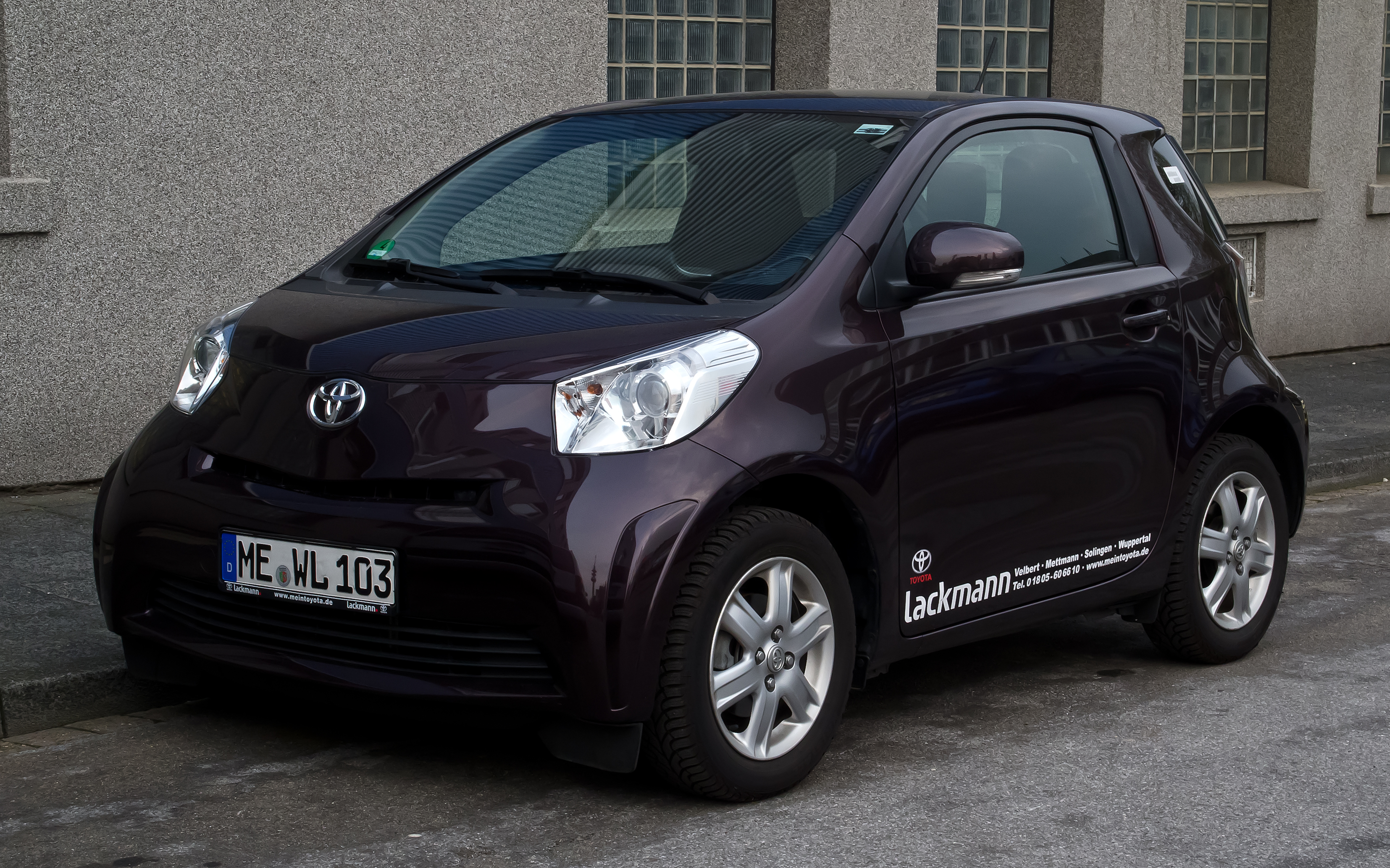 Toyota iQ 1.0